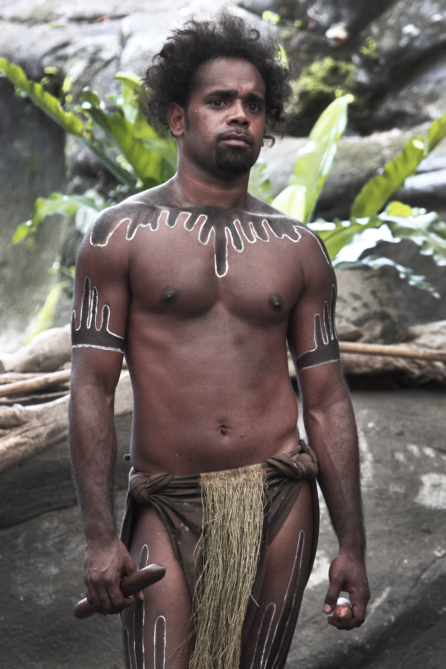 Australia: Aboriginal Culture 017